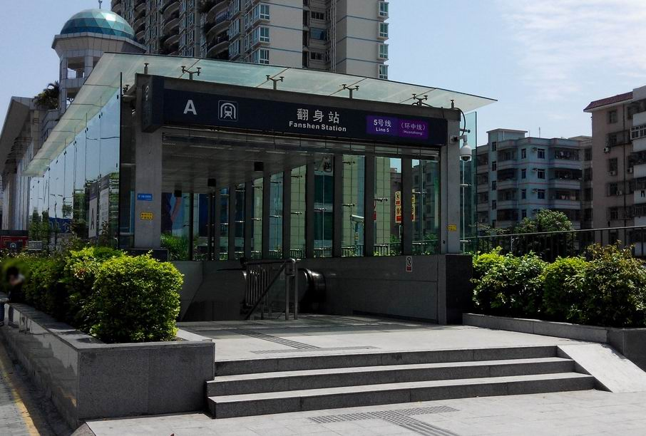 深圳地铁5号线翻身站A出口